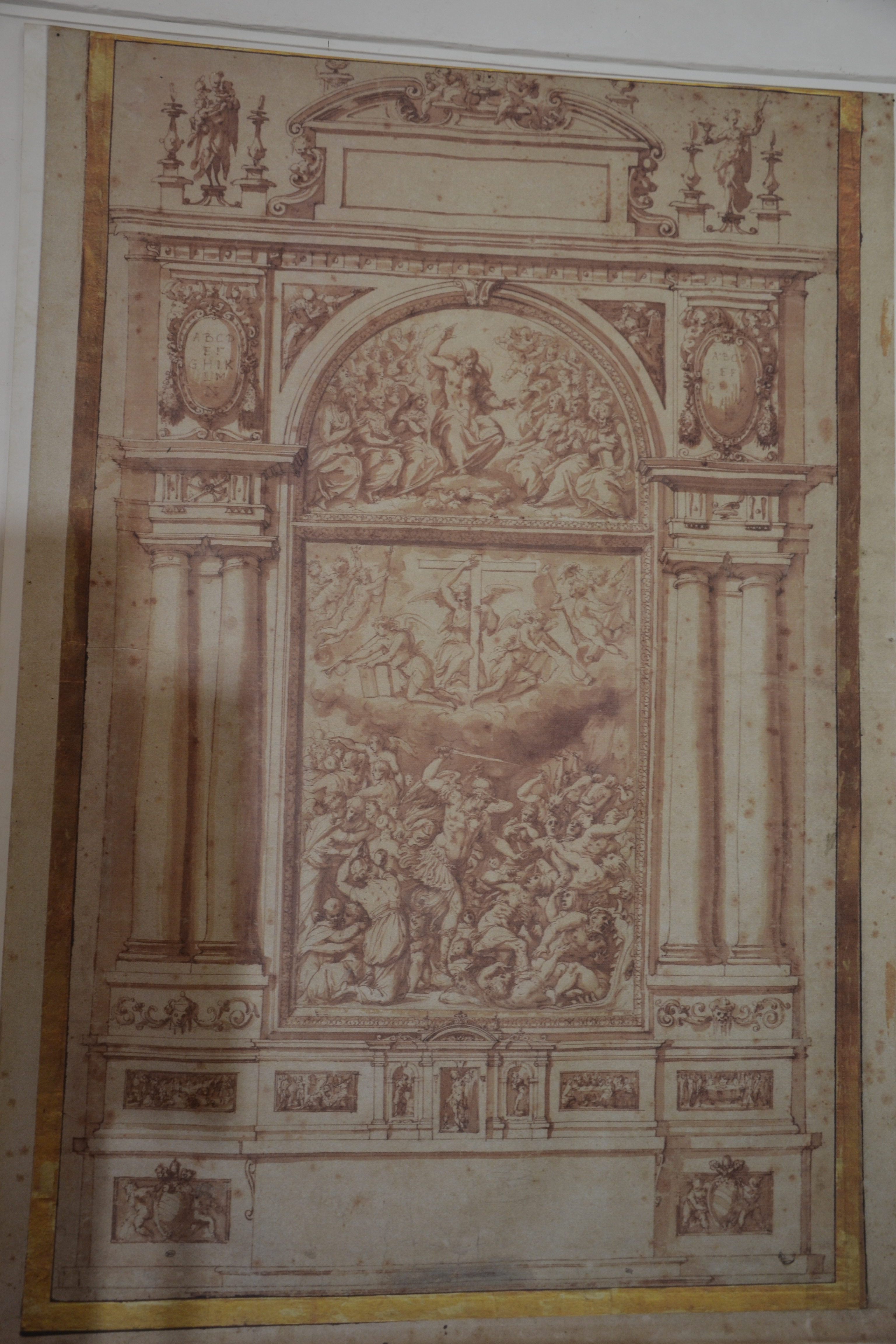 convento domenicano di Santa Croce a Bosco Marengo (AL) realizzato per volontà di papa Pio V nella seconda metà del sec. XVI, nel 1862 divenne riformatorio giovanile fino al 1989. Altare progettato da Giorgio Vasari nel 1569 a Firenze con pittori della sua bottega tra cui Francesco Morandini detto “Il Poppi”, Jacopo Zucchi e Giovanni Battista Naldini